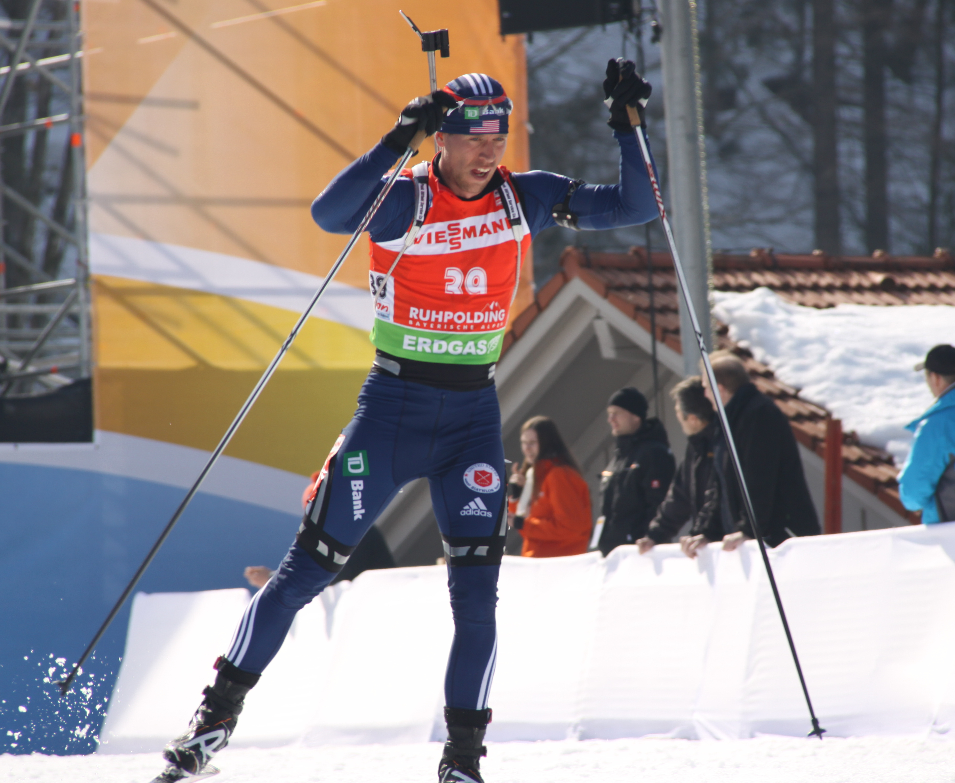 Jay Hakkinen USA